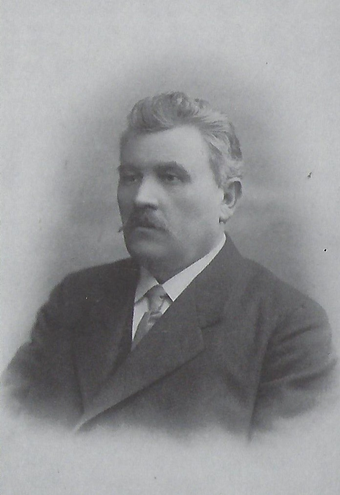 Porträtfotografie des bessarabiendeutschen Bauern und Politikers Andreas Widmer